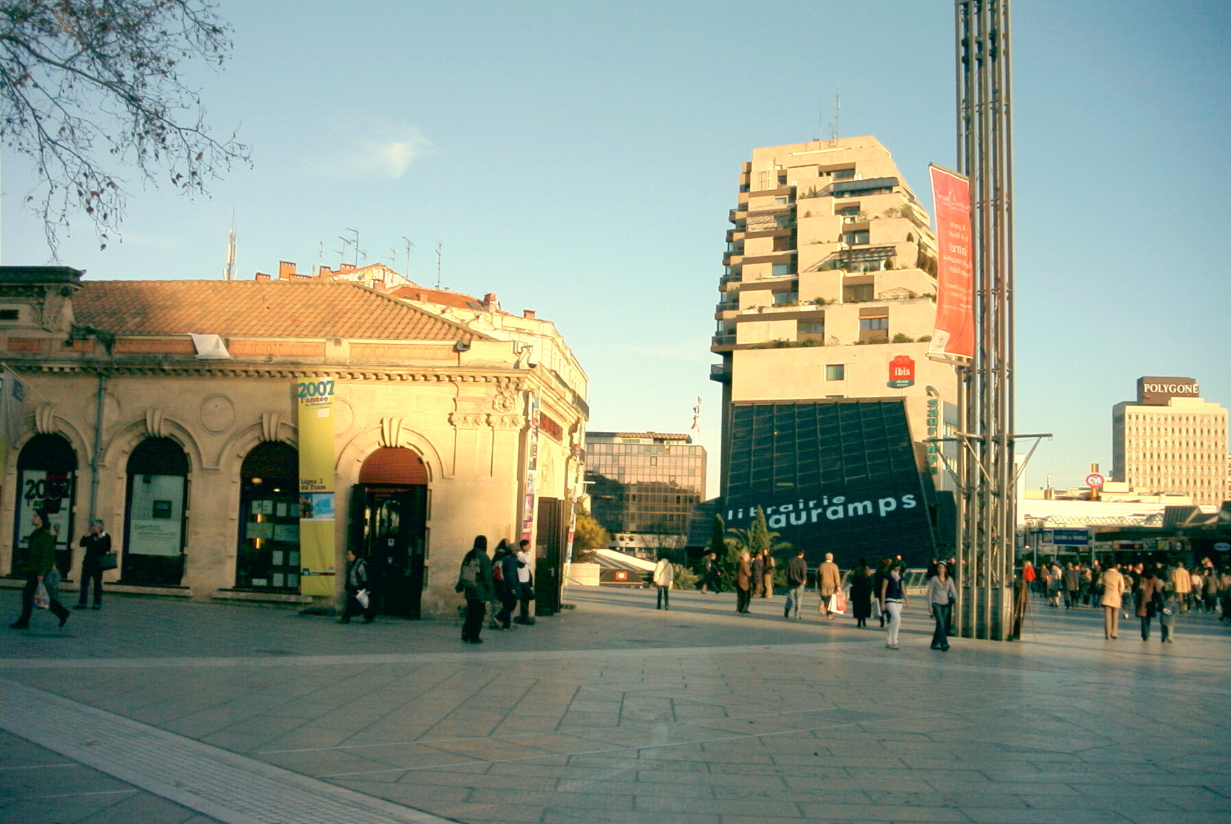 Tour Le Triangle, Montpellier (Hérault, France).